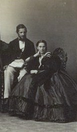 Николай Александрович Кушелев-Безбородко (1834—1862) c женой Елизаветой Ивановной, урожд. Базилевской (1839— ?), в первом браке Шупинская.